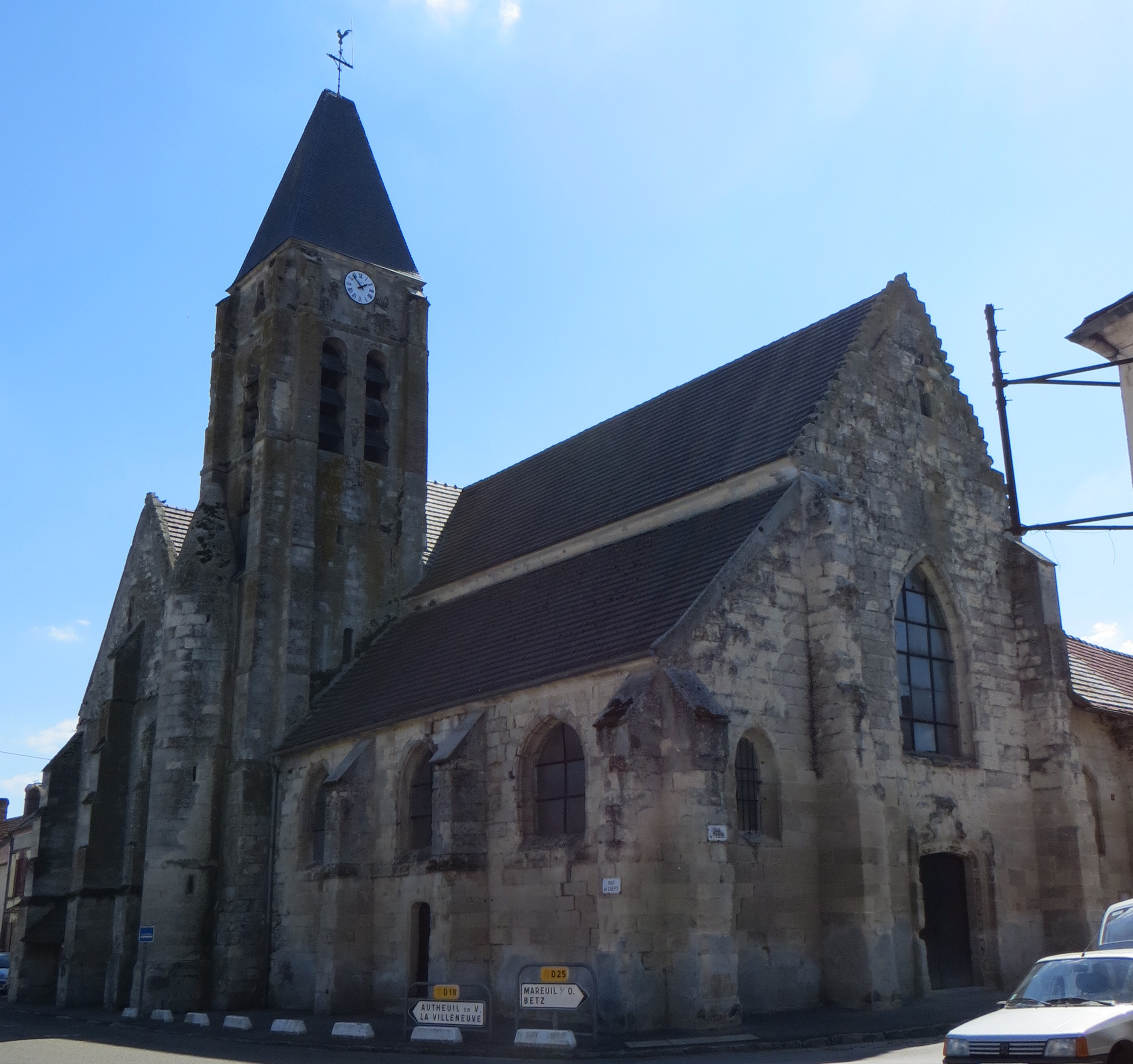 Vue générale de l'église